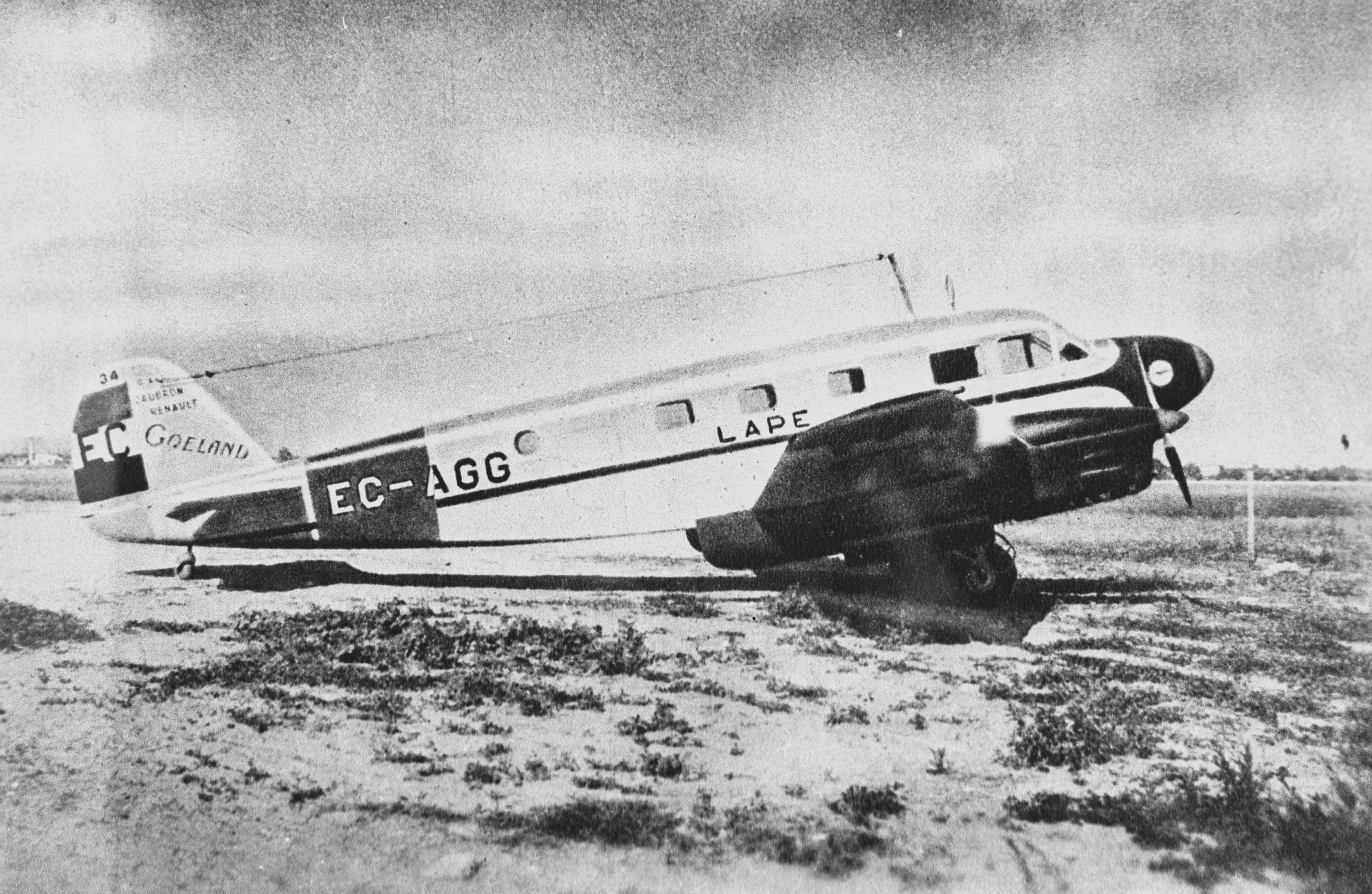 Caudron C.448, matrícula EC-AGG, utilizado por la LAPE.